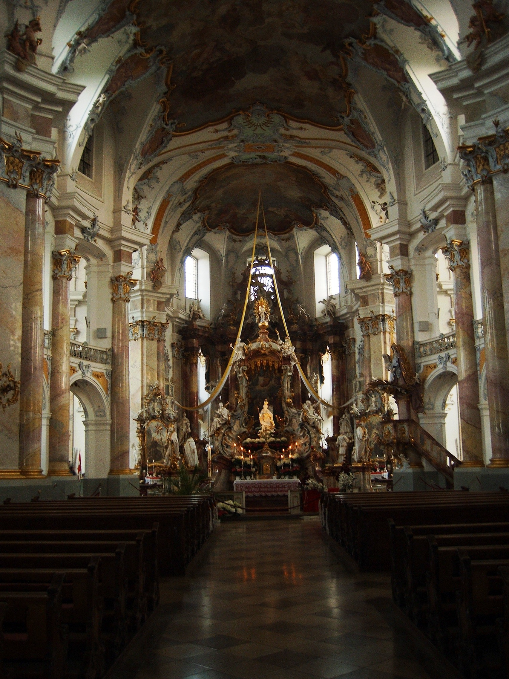 Vierzehnheiligen von innen Sonstiges: ...